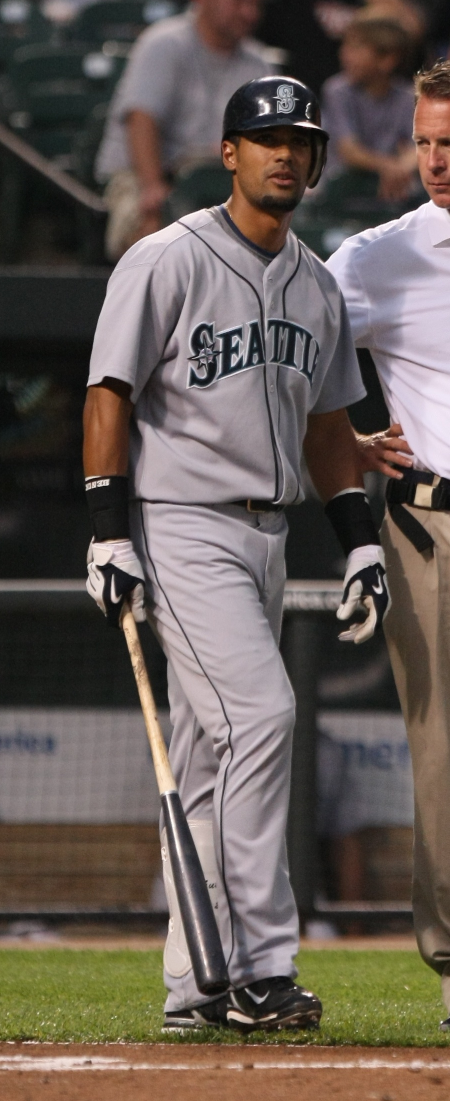 Franklin Gutiérrez